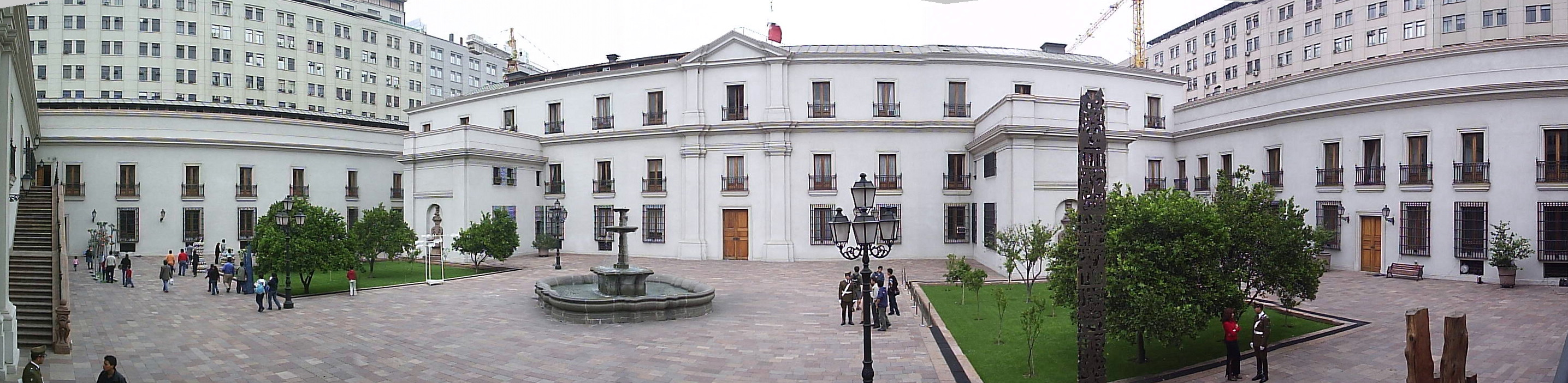 Panorámica del Patio de los Naranjos del Palacio de La Moneda Autor:Alstradiaan Alstradiaan Blog Fecha:Abril de 2005 Fotografía tomada con una cámara digital Olympus camedia D-395 de 3.2 megapixeles